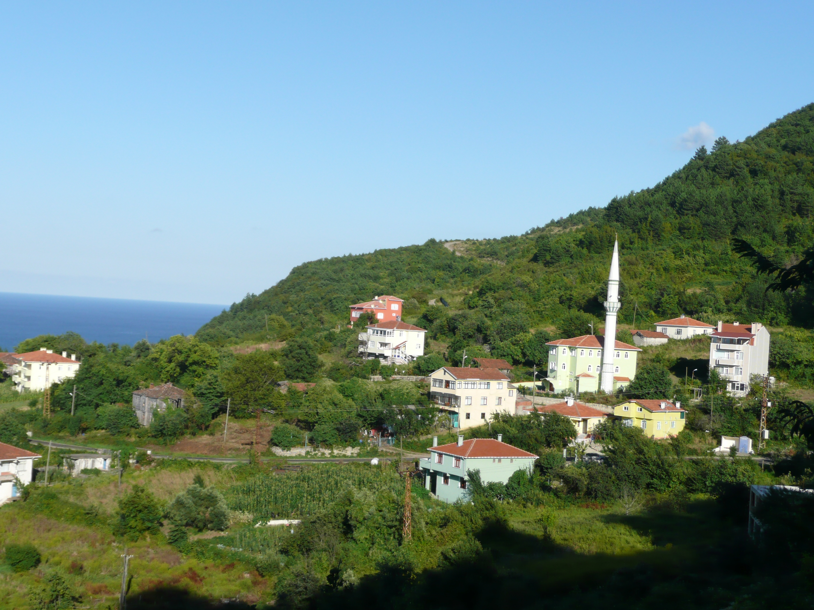 aydıncık köyü,cide,kastamonu